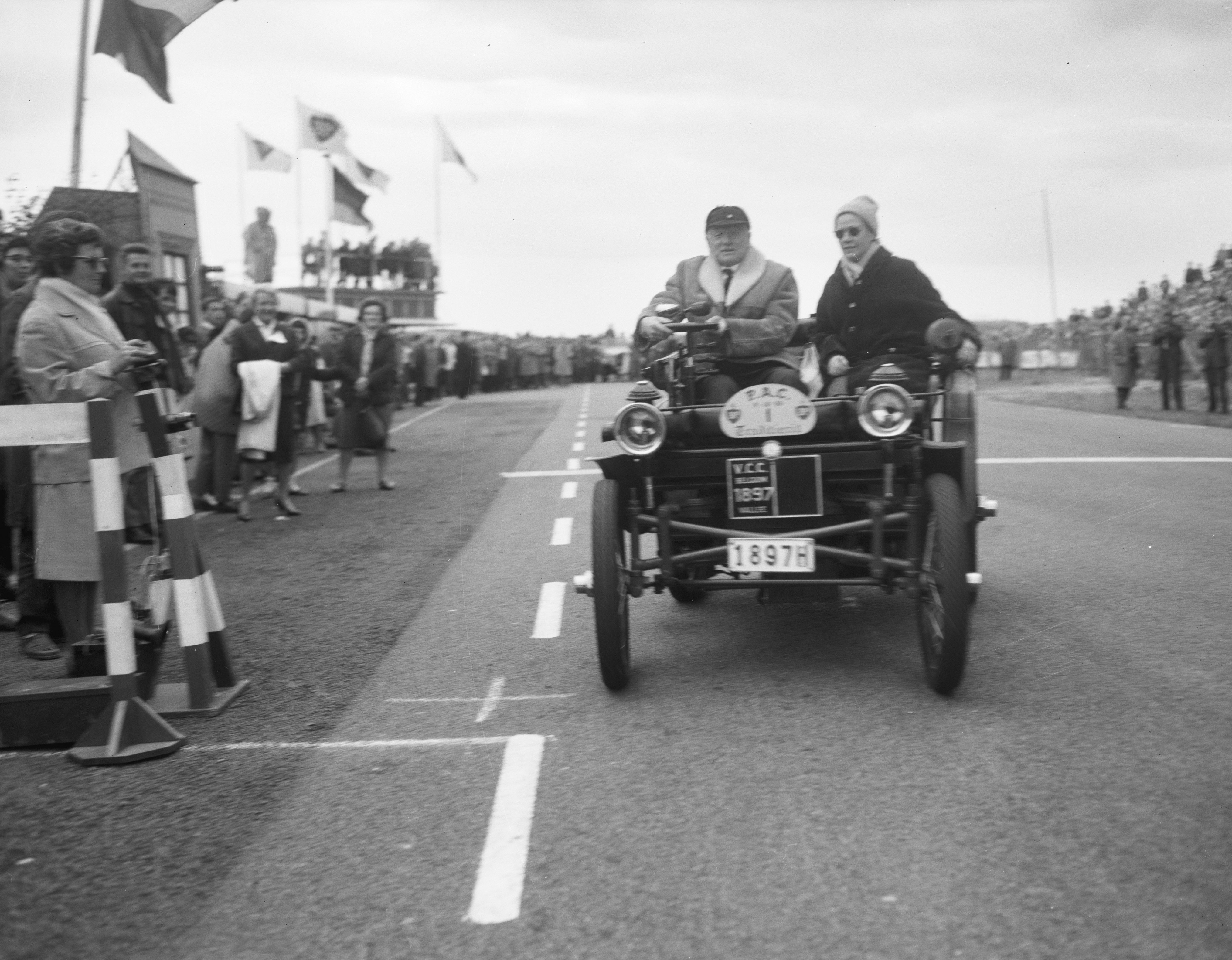 Collectie / Archief : Fotocollectie Anefo Reportage / Serie : [ onbekend ] Beschrijving : Vijfde traditierit van de Pioneer Automobiel Club Datum : 9 oktober 1960 Trefwoorden : traditieritten Instellingsnaam : Pioniers Automobiel Club Fotograaf : Bilsen, Joop van / Anefo Auteursrechthebbende : Nationaal Archief Materiaalsoort : Negatief (zwart/wit) Nummer archiefinventaris : bekijk toegang 2.24.01.04 Bestanddeelnummer : 911-6602